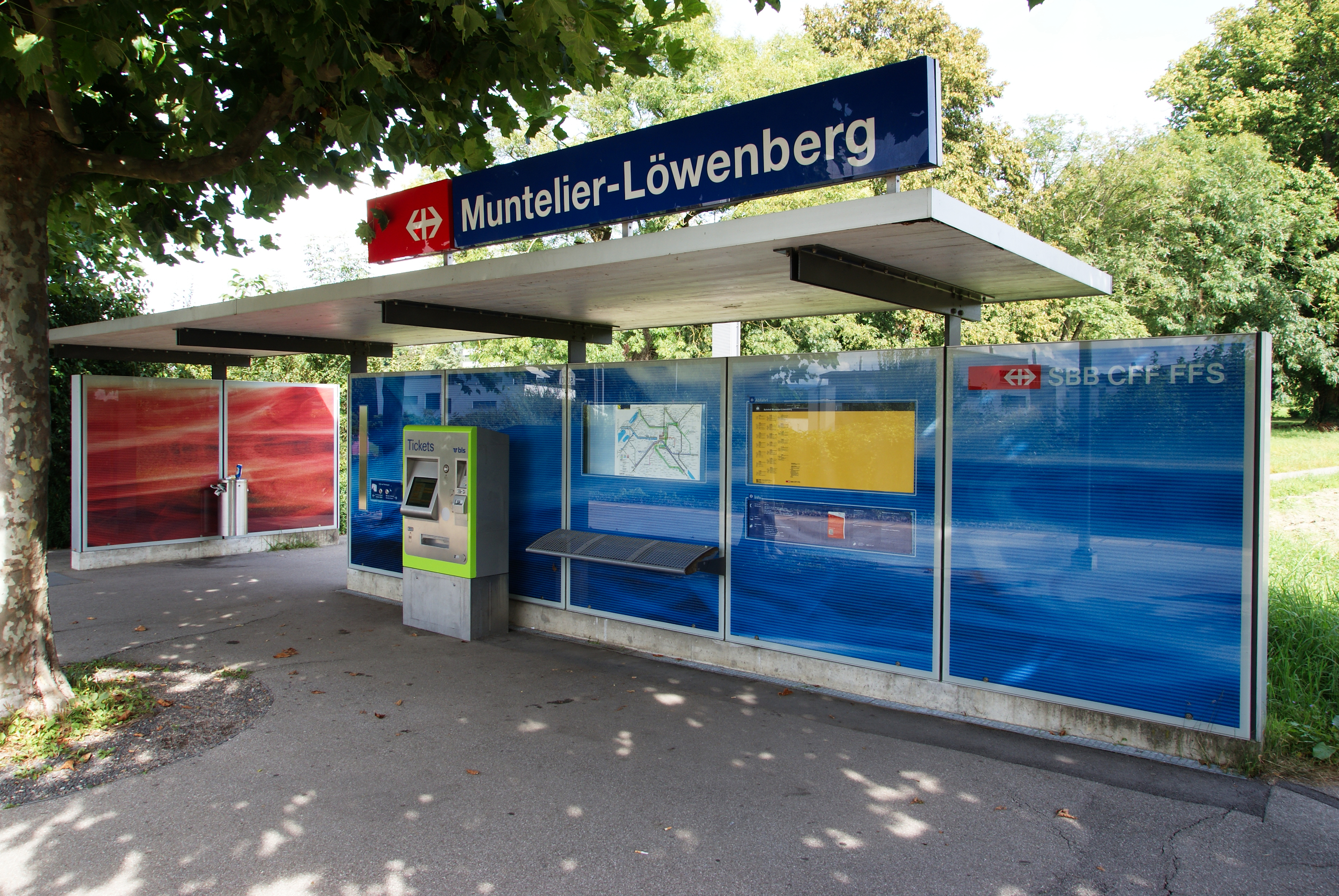 Haltestelle Muntelier-Löwenberg beim Centre Loewenberg.